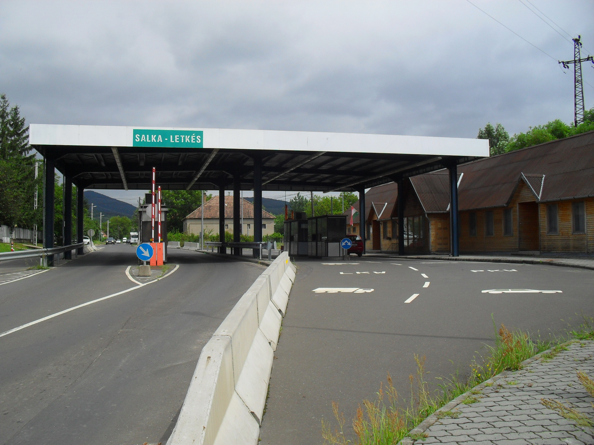 Letkés - a volt határátkelőhely épülete